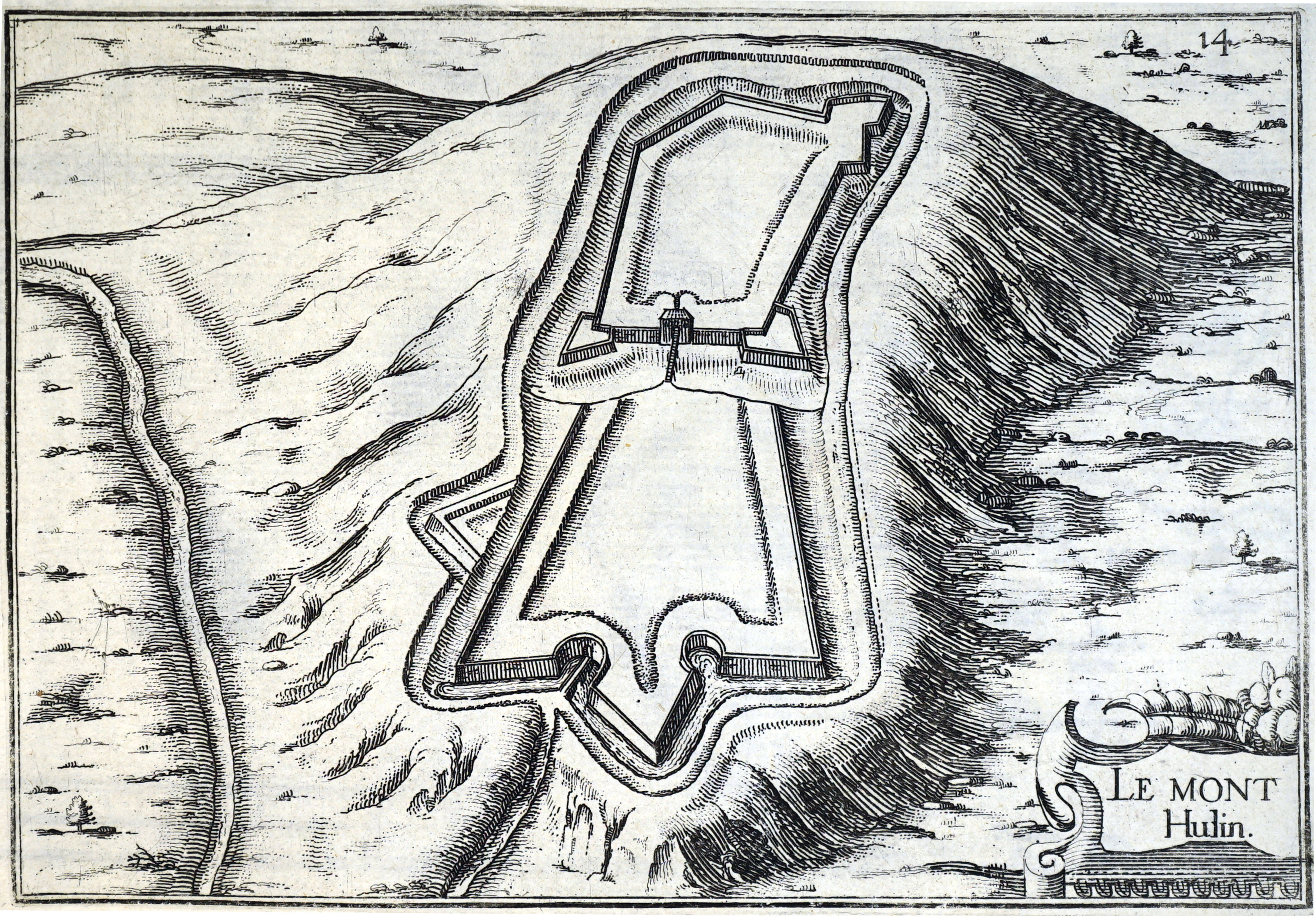 sur un dessin de Tassin.